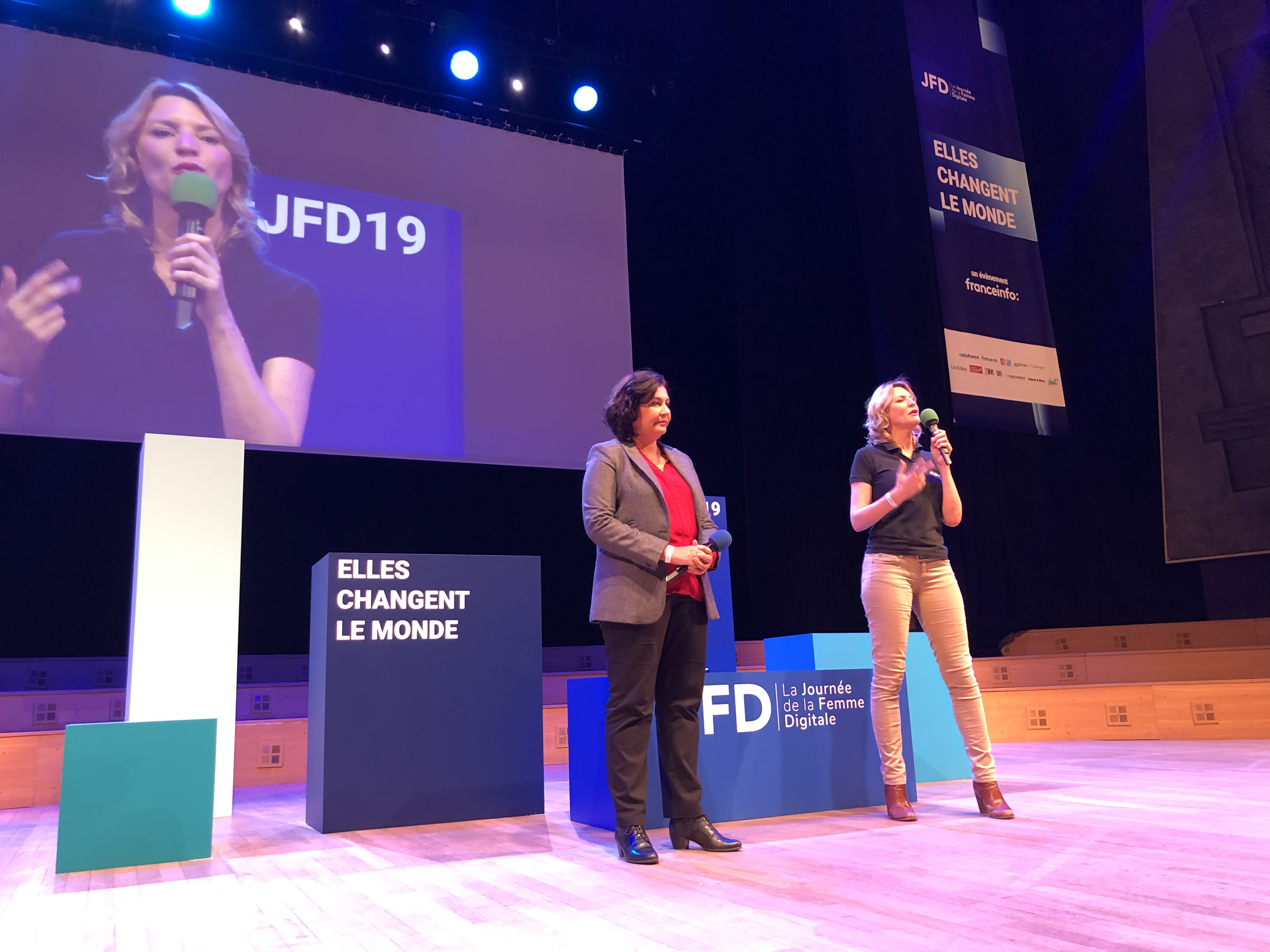 Amanda Ouedraogo et Florence Trouche à la JFD19 journée de la femme digitale Paris 2019